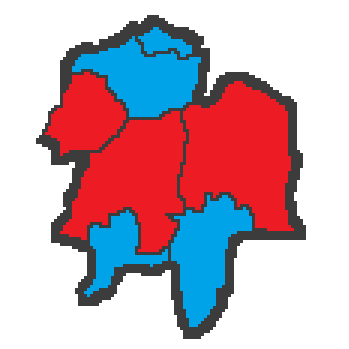 Alcaldes Comarca de Caldas